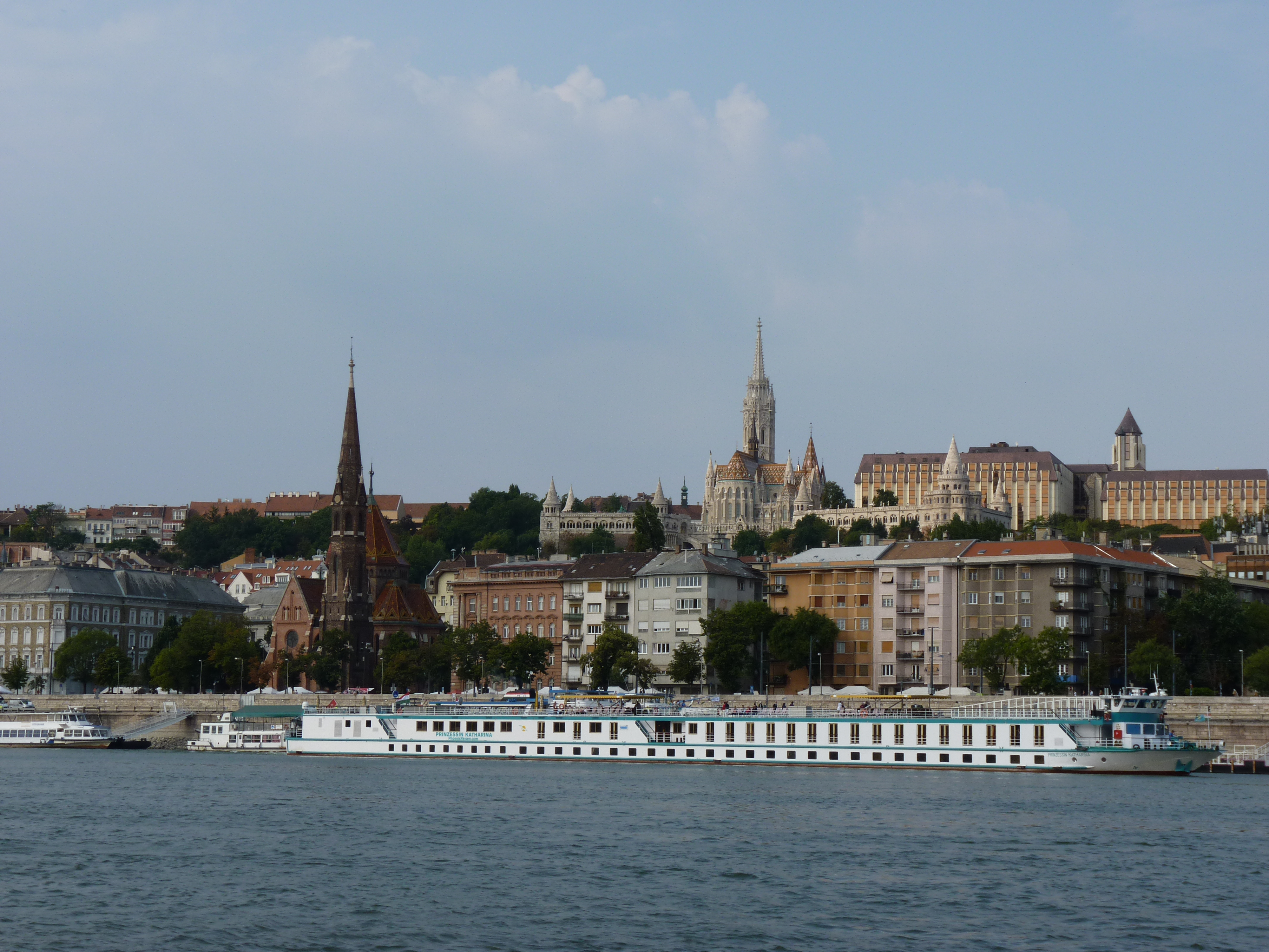 Duna folyam, rakpartok egy része